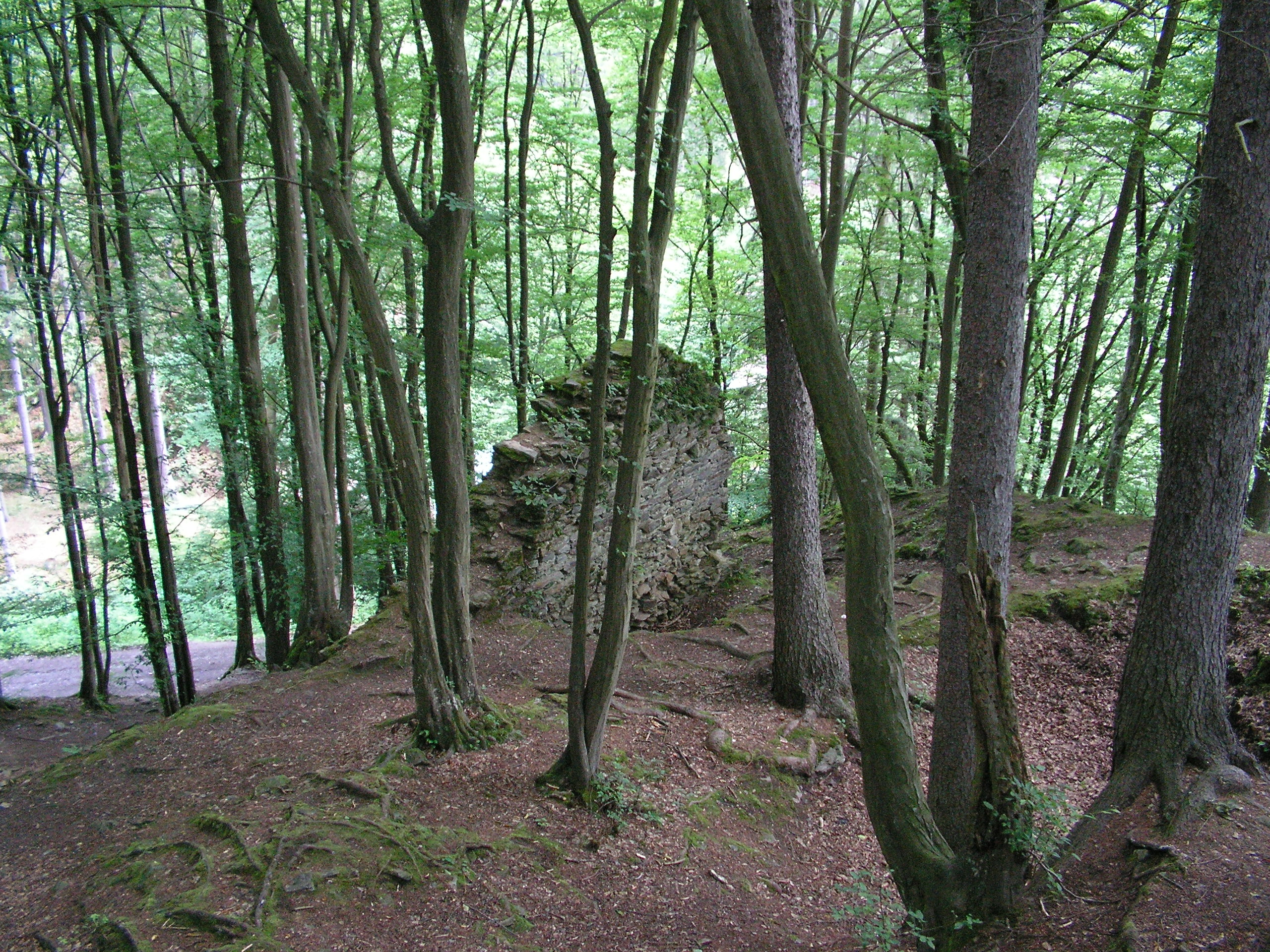 Zbytky hradeb Chřenovického hradu, jehož zřícenina se nachází v západní části okresu Havlíčkův Brod.